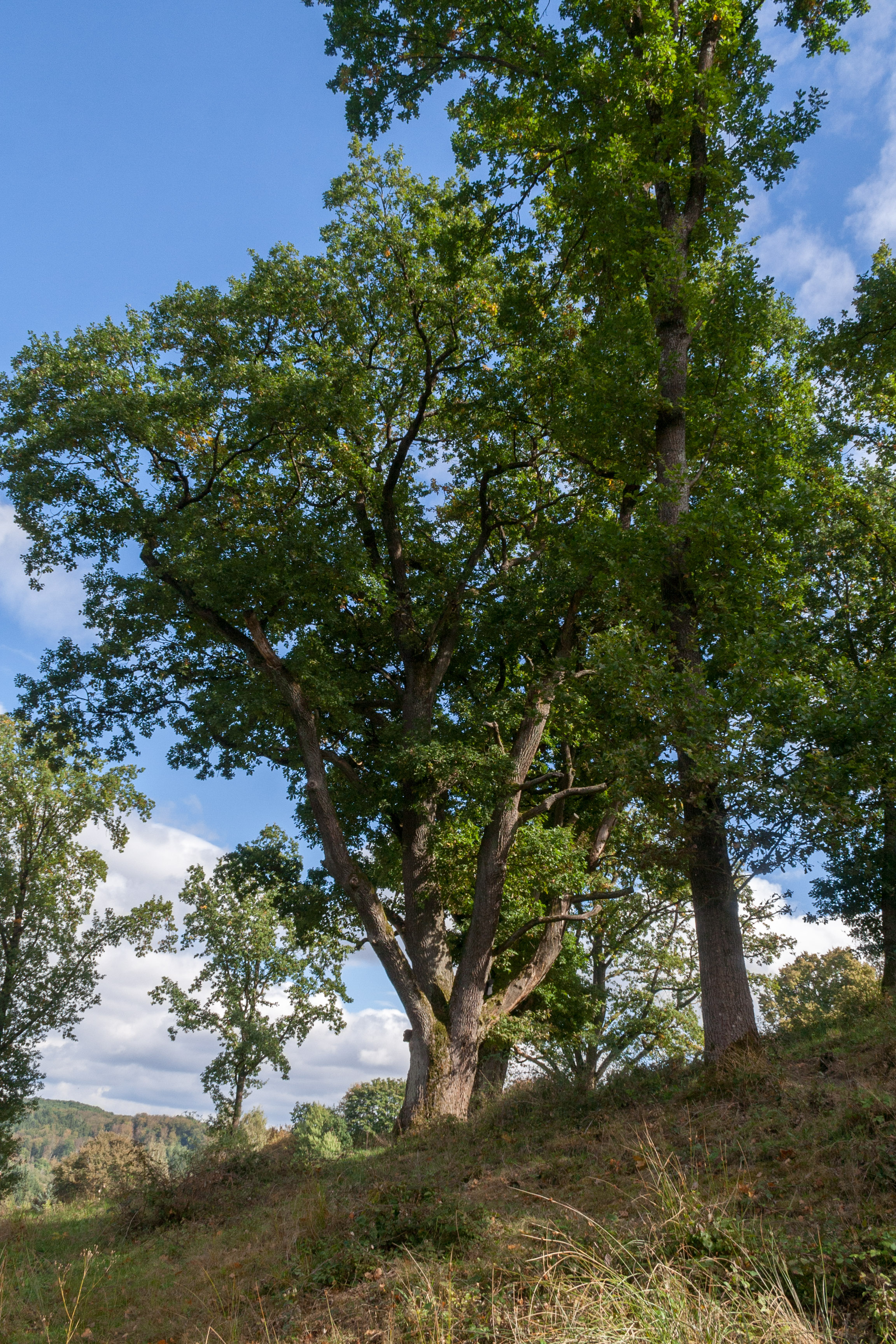 Burgeichen am Burgberg von Burgthann, Naturdenkmal